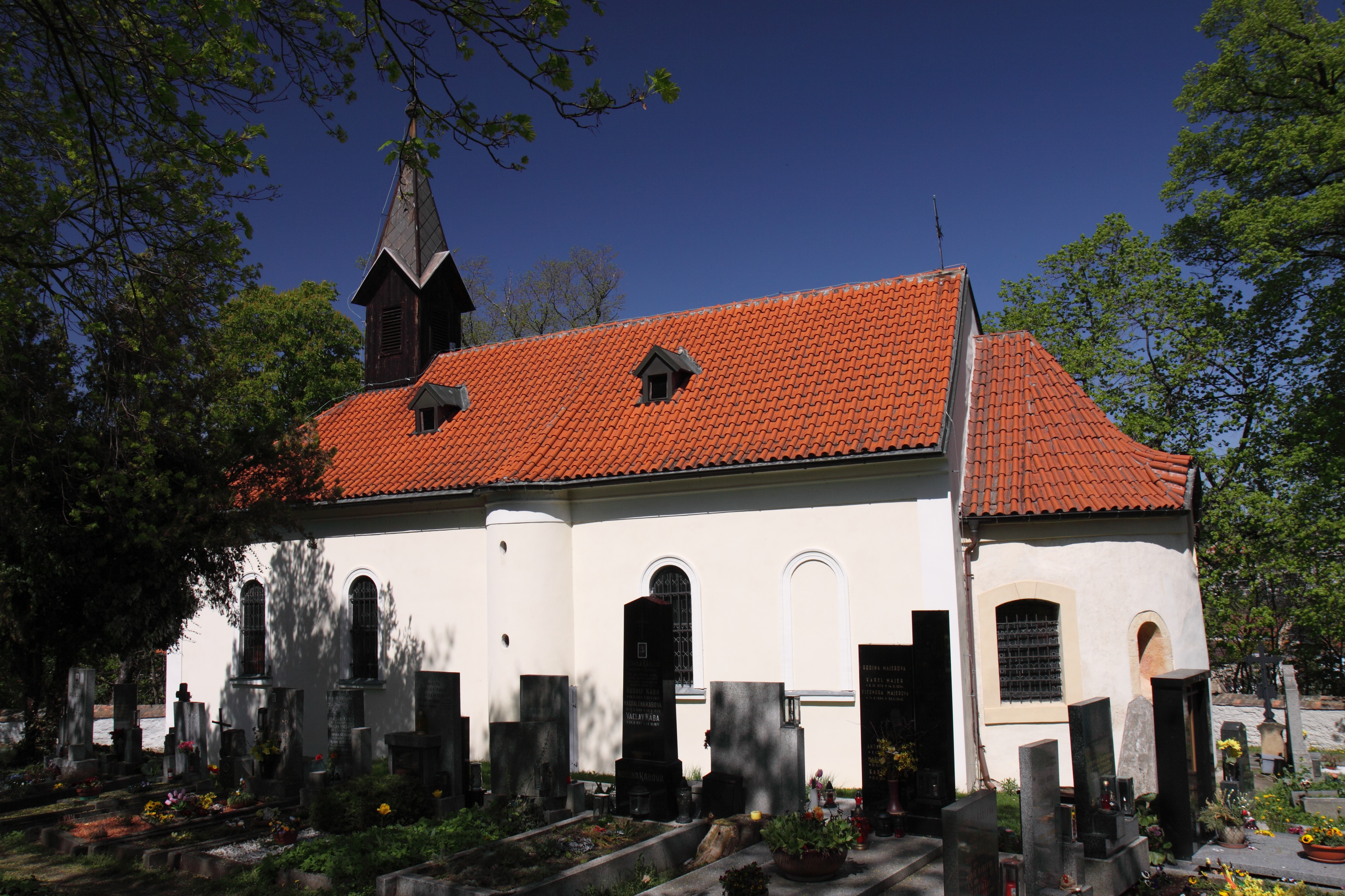 Kostel sv. Vavřince ve starých Butovicích